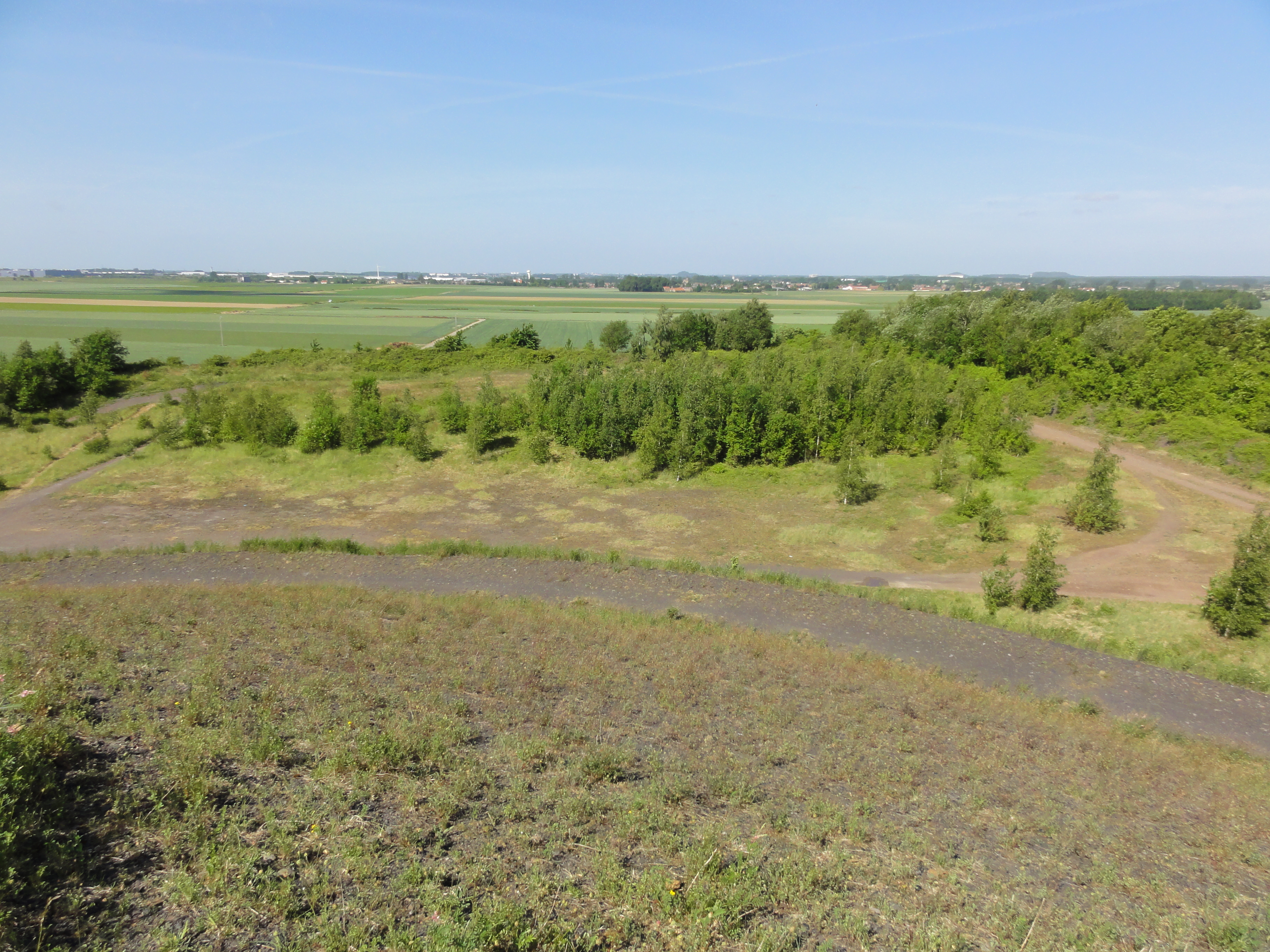 Terril n° 200A dit 2 de Crespin plat, Fosse n° 2 - 2 bis de la Compagnie des mines de Crespin, Quiévrechain, Nord, Nord-Pas-de-Calais, France.